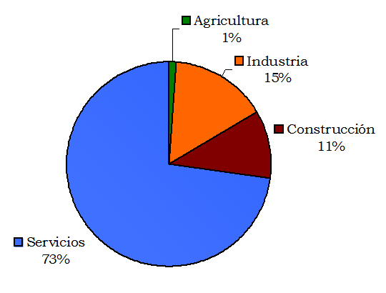 Ocupados por sector de actividad (Valladolid)